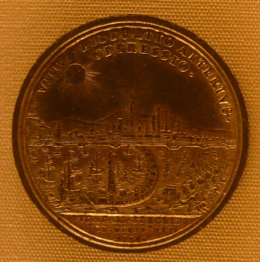 Medalla commemorativa. Col·lecció de numísmàtica del Museu Nacional d'Art de Catalunya.